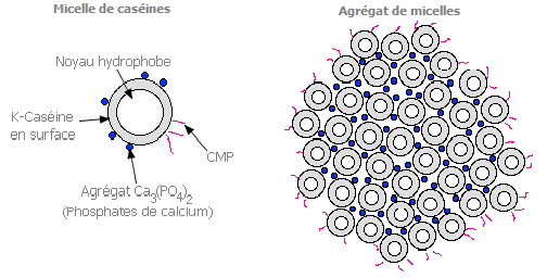 Agrégat des micelles de caséines suite à la coagulation présure du lait.